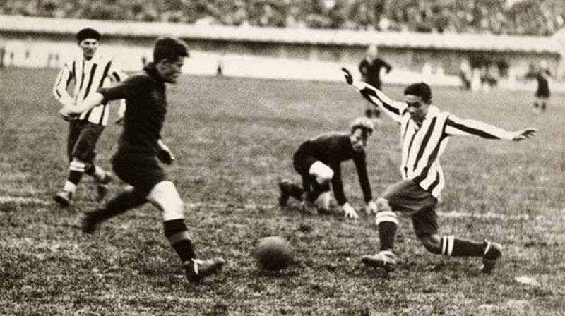 Wc 1930 belgica paraguay